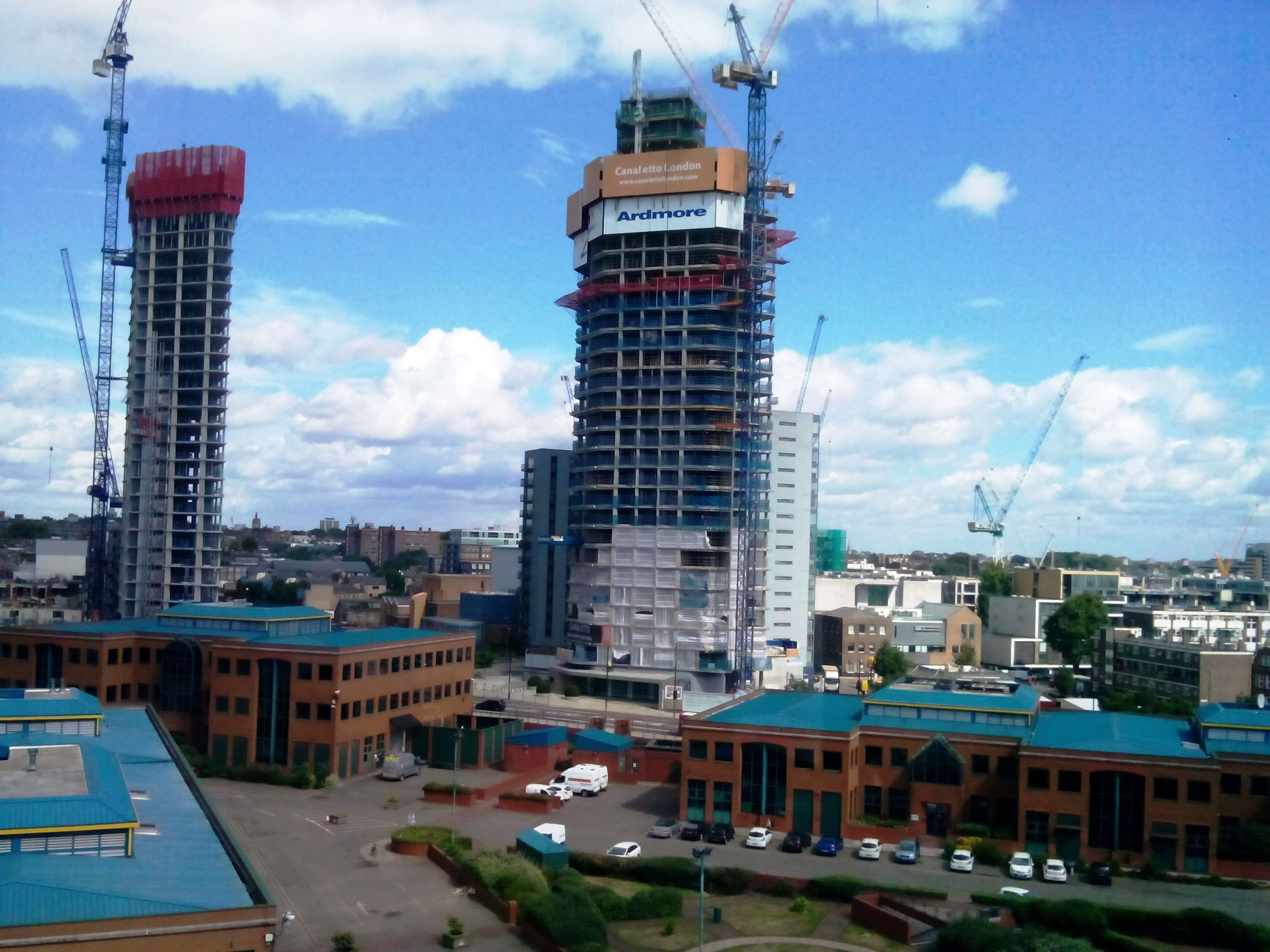 مدينة لندن.. أغسطس 2014.